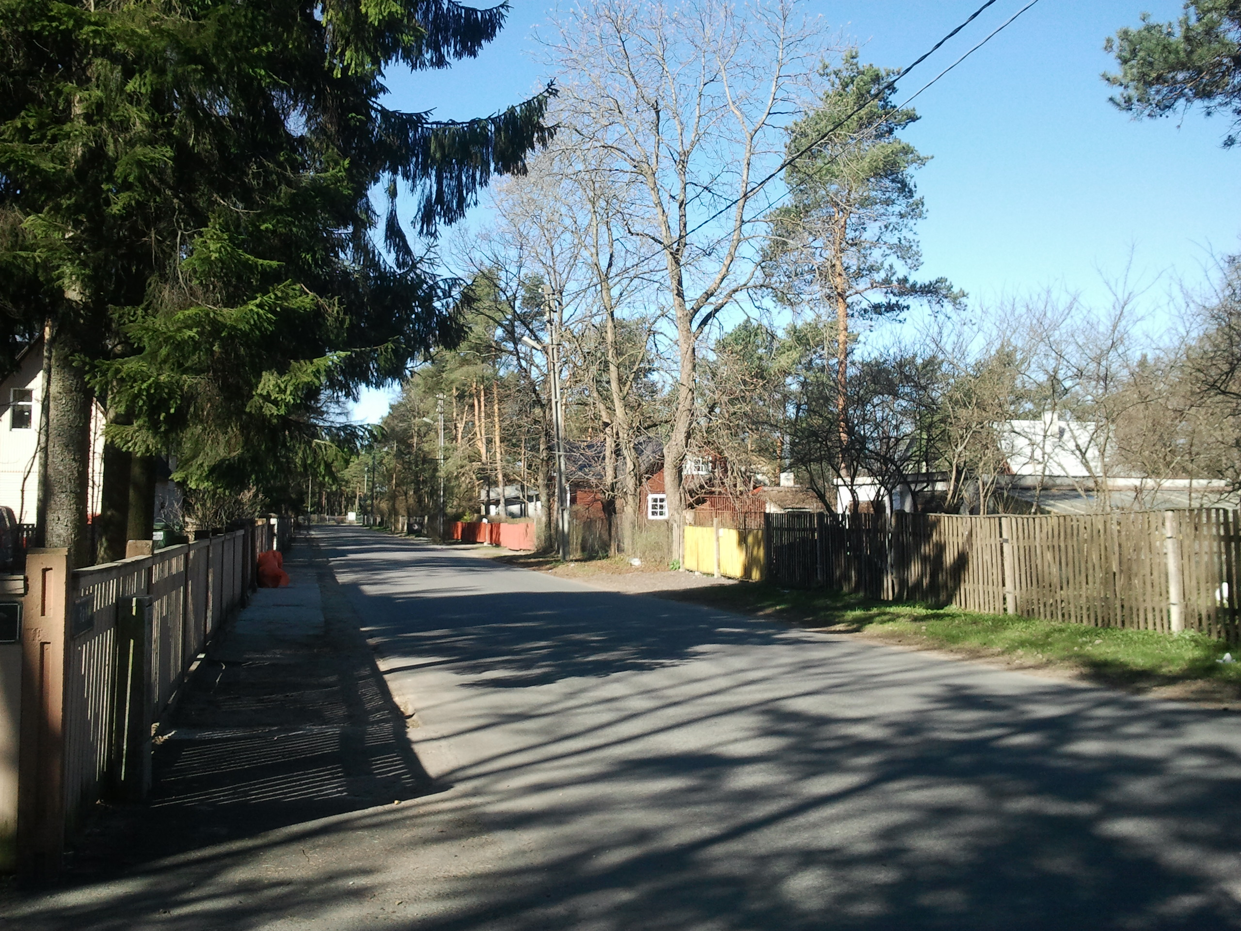 Vaade Rahu tänavale Kärje tänavalt Pargi tänava suunas